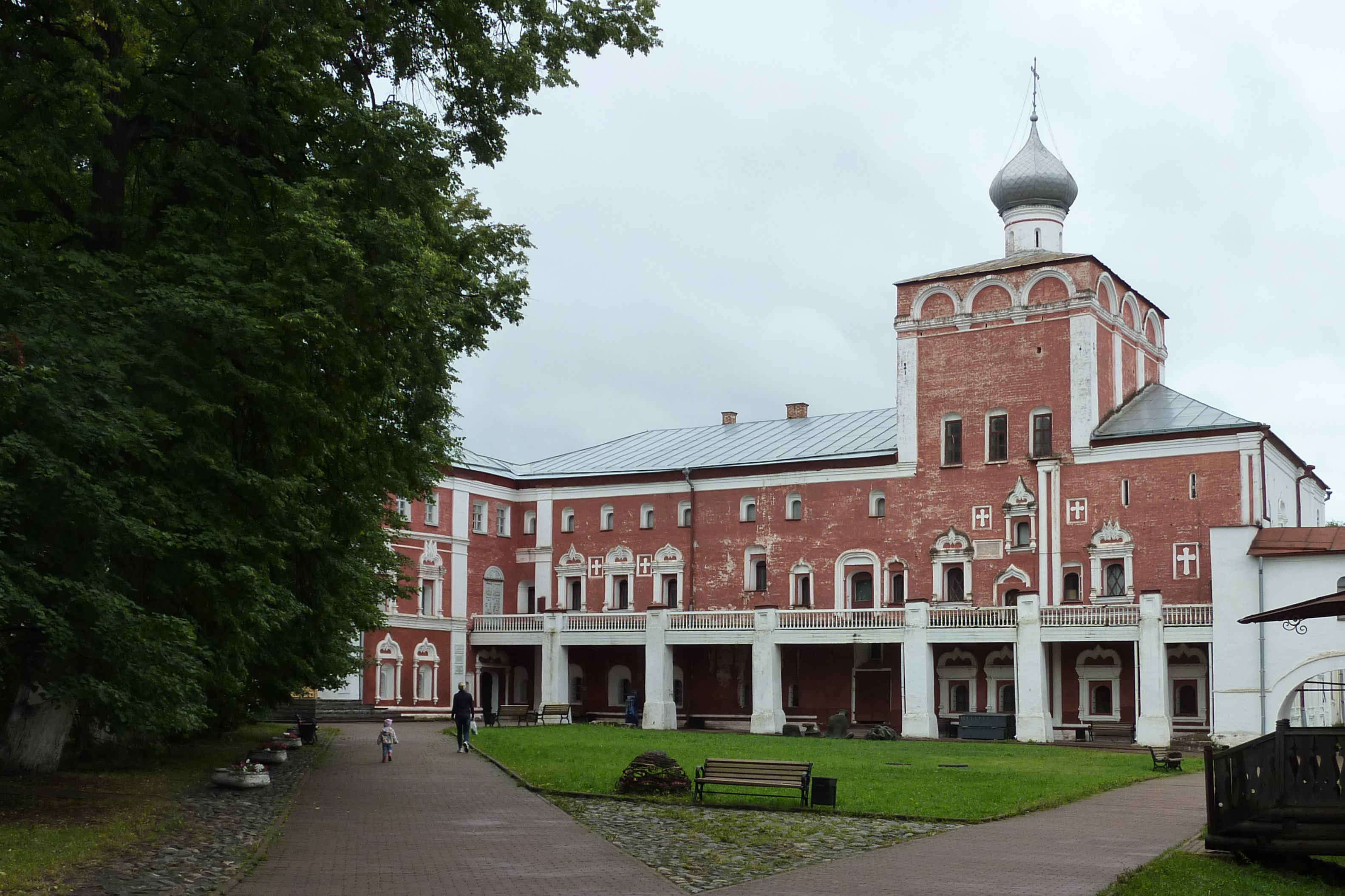 Simonov case with Church of the Nativity / Симоновский корпус с церковью Рождества Христова